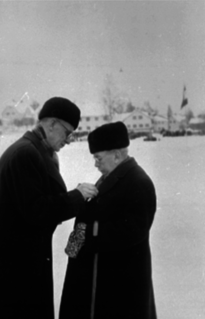 ORDFØRER ERLING AUDENSEN, HAMARMEDALJEN, SKØYTELØPER EINAR HALVORSEN